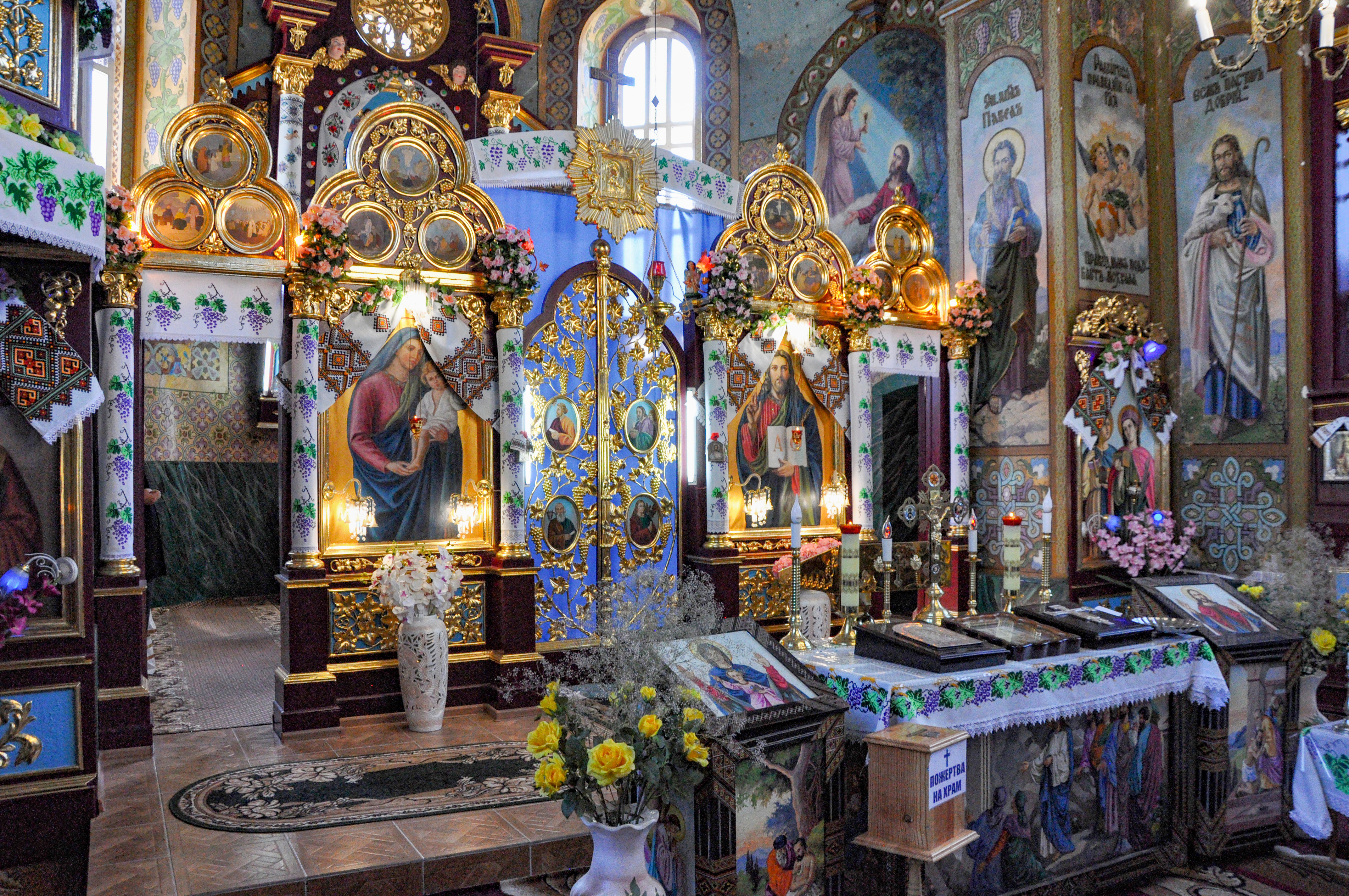 Іконостас в храмі святих великомучеників і безсрібників Косми і Даміана в селі Шманьківці Чортківського району Тернопільської області України.